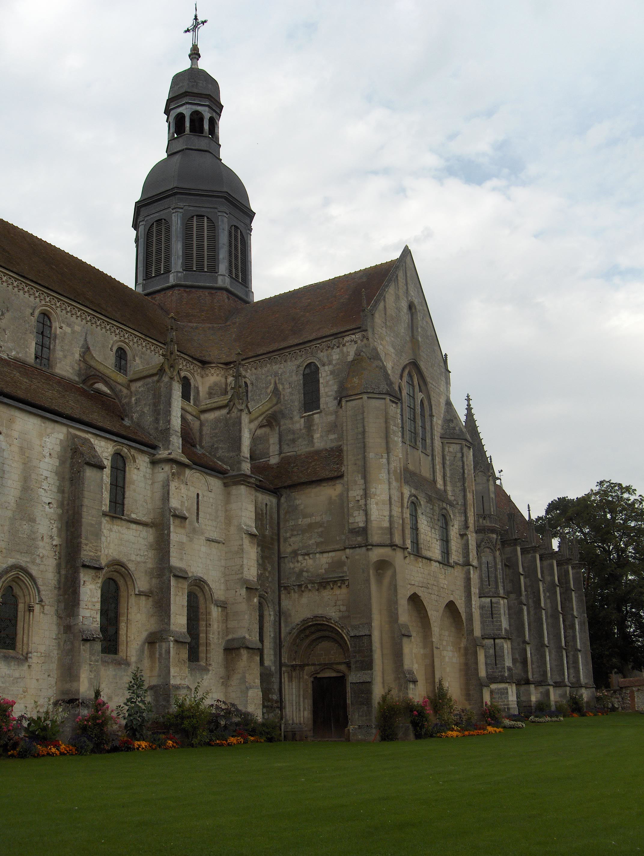 Vue partielle de l'abbaye Saint-Germer-de-Fly